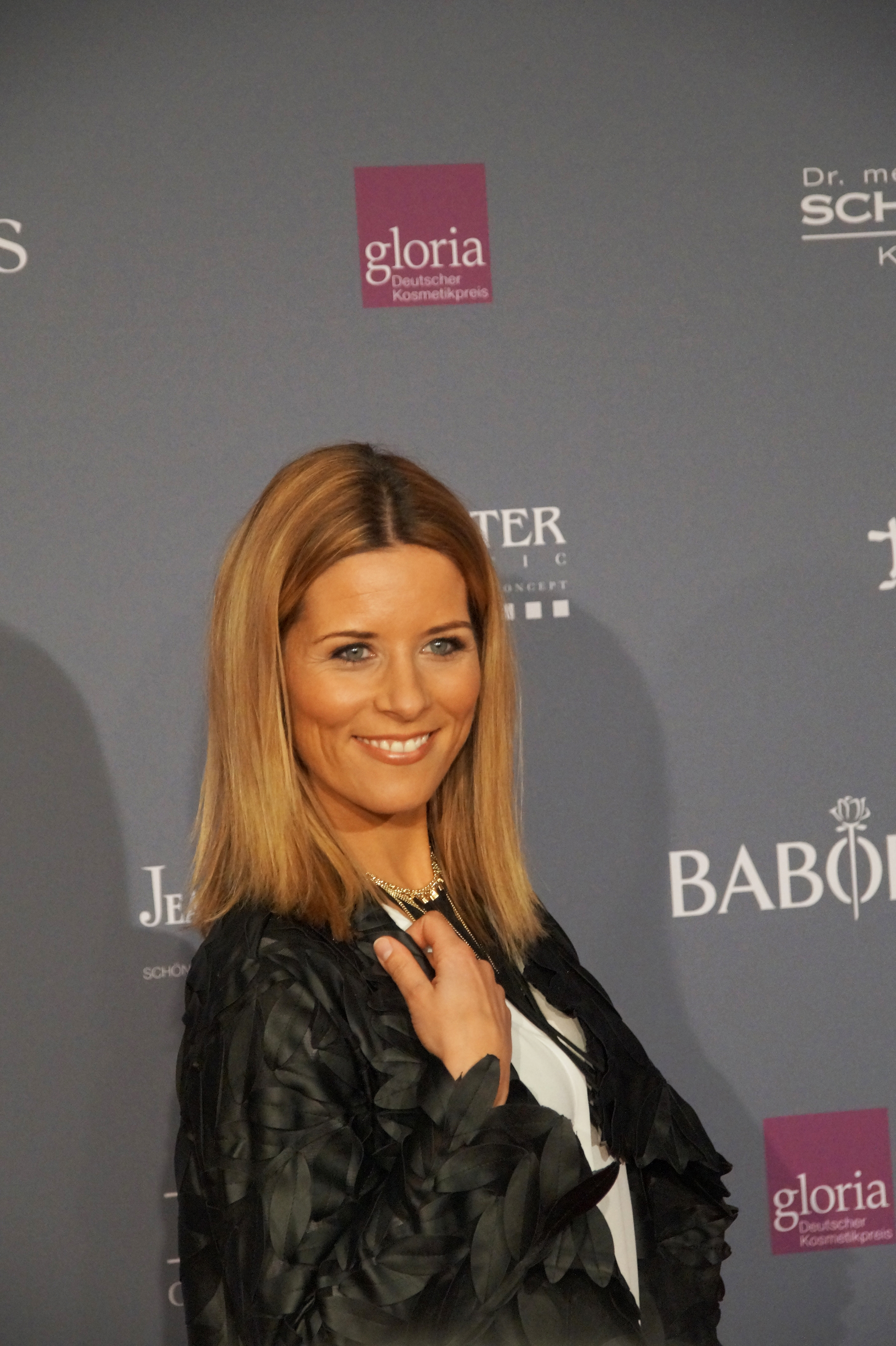 Miriam Lange beim "Gloria – Deutscher Kosmetikpreis" am 04. März 2016 im Hilton Hotel Düsseldorf.